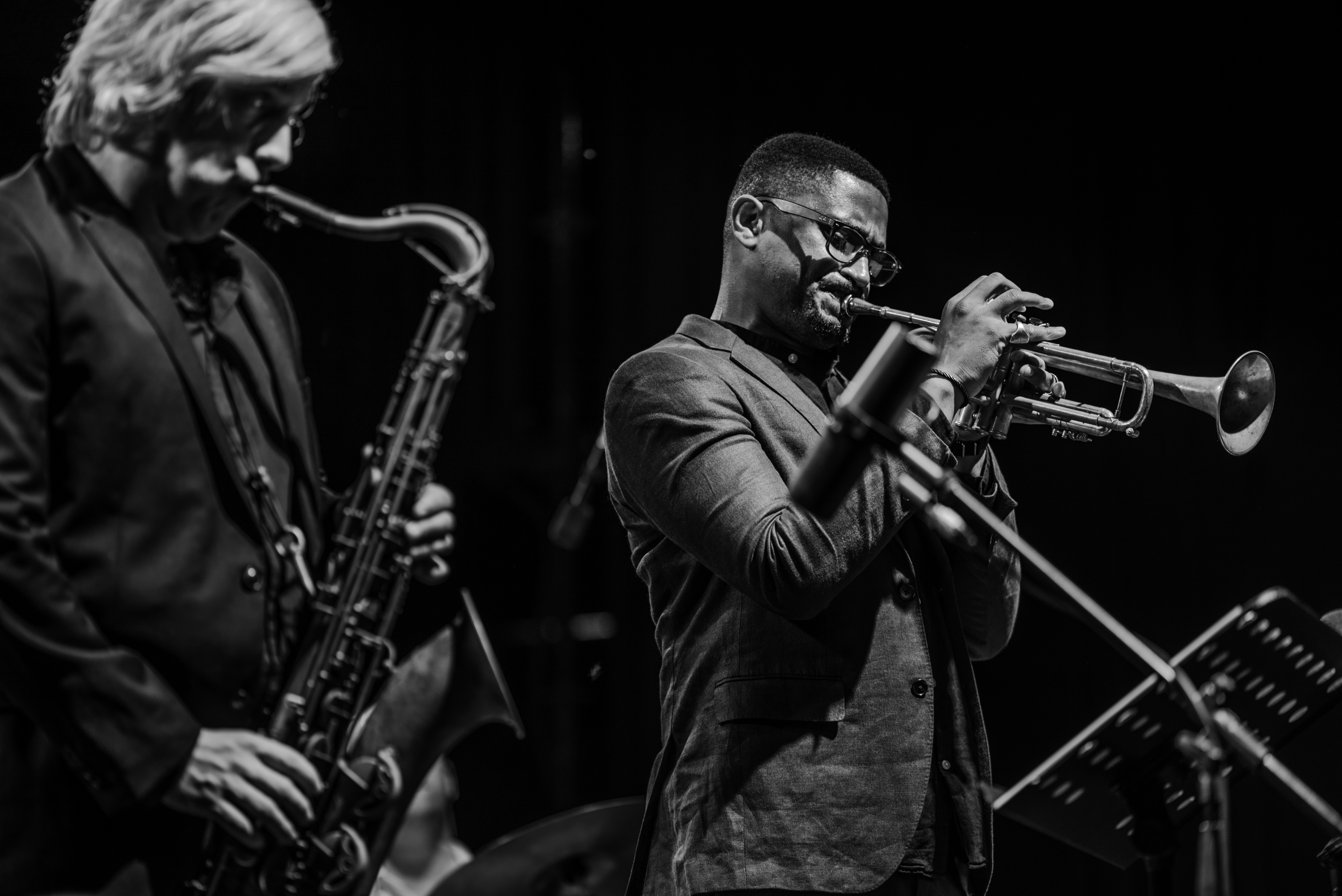 BRUCE HARRIS Quartet Tribute to the Group of "CLIFFORD BROWN and MAX ROACH" • Emmet COHEN / Piano • Clovis NICHOLAS / Bass • Pete Van NOSTRAND / Battery • Bruce HARRIS / Trumpet Special guest: • Grant STEWART / Tenor Saxo 22 Festival Internacional de Jazz de Punta del Este. El Sosiego, Punta del Este, Maldonado, Uruguay. Camera: NIKON D810 Lens: Zeiss Apo Sonnar T* 2/135 ZF.2 0 ISO: 64